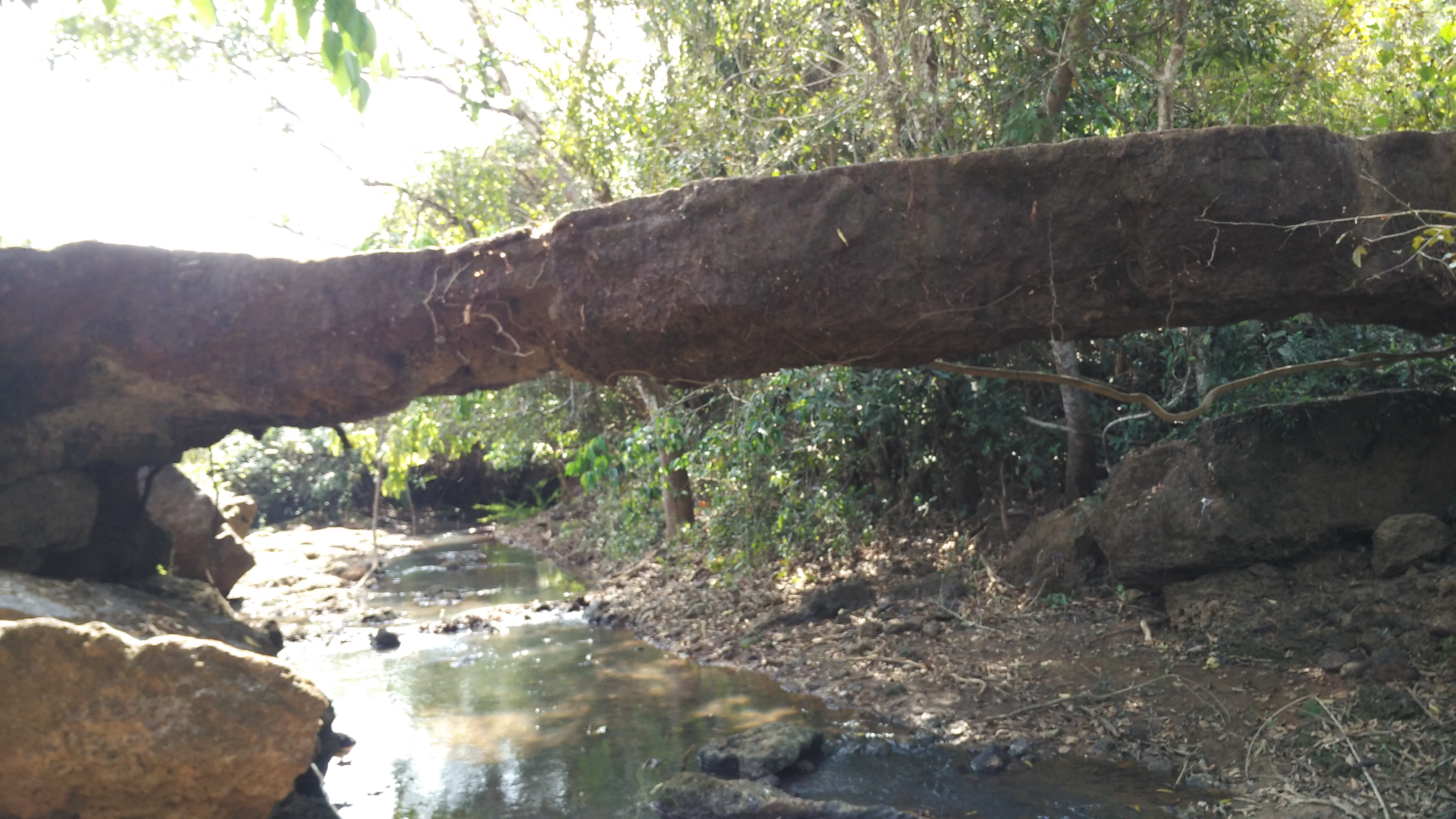 ಕನ್ನಡ: ನೈಸರ್ಗಿಕವಾಗಿ ಕಲ್ಲಿನಿಂದ ರಚನೆಯಾಗಿರುವ ಕಿರುಸೇತುವೆ